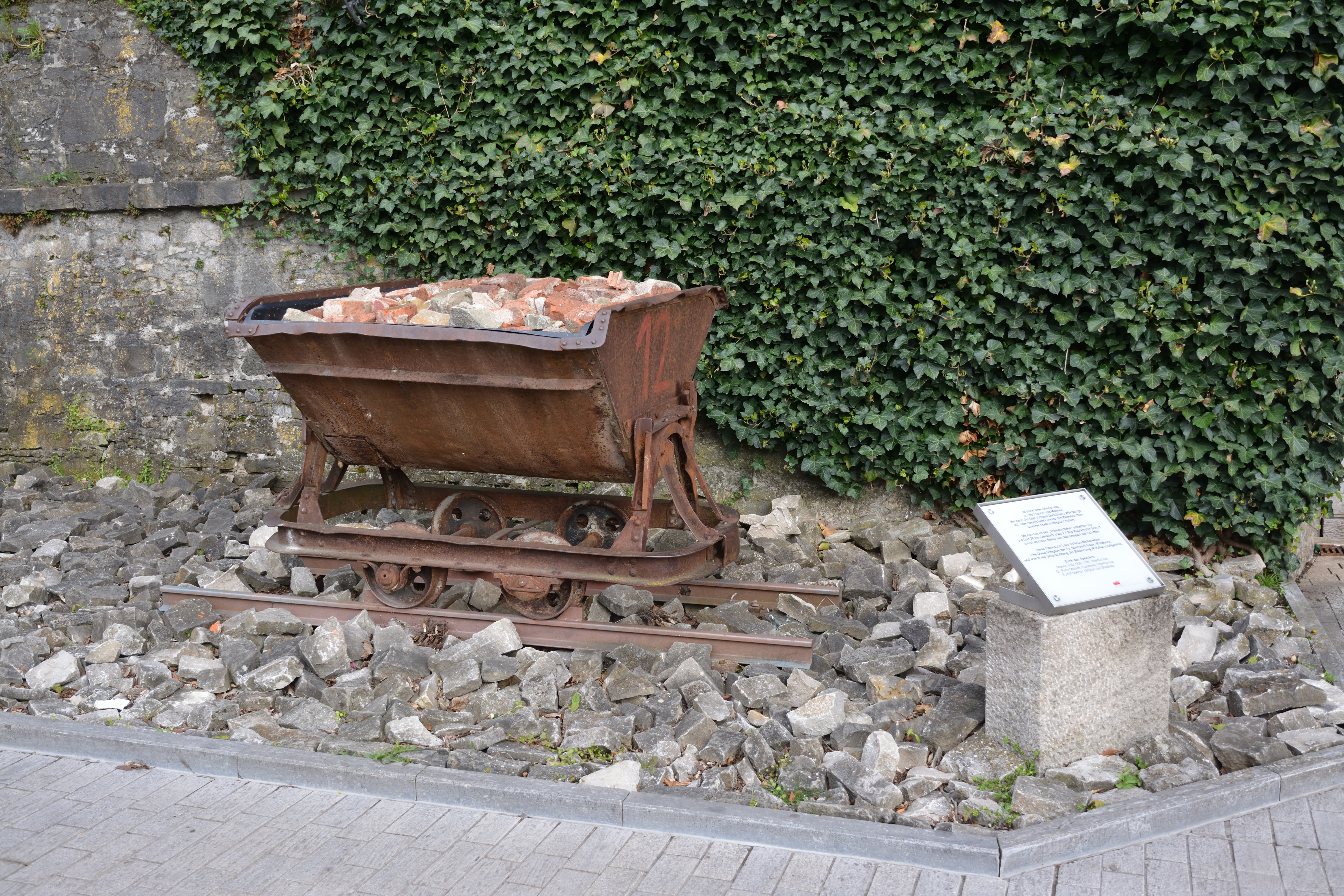 Denkmal für die Trümmerfrauen und -männer am Kranenkai in Würzburg.